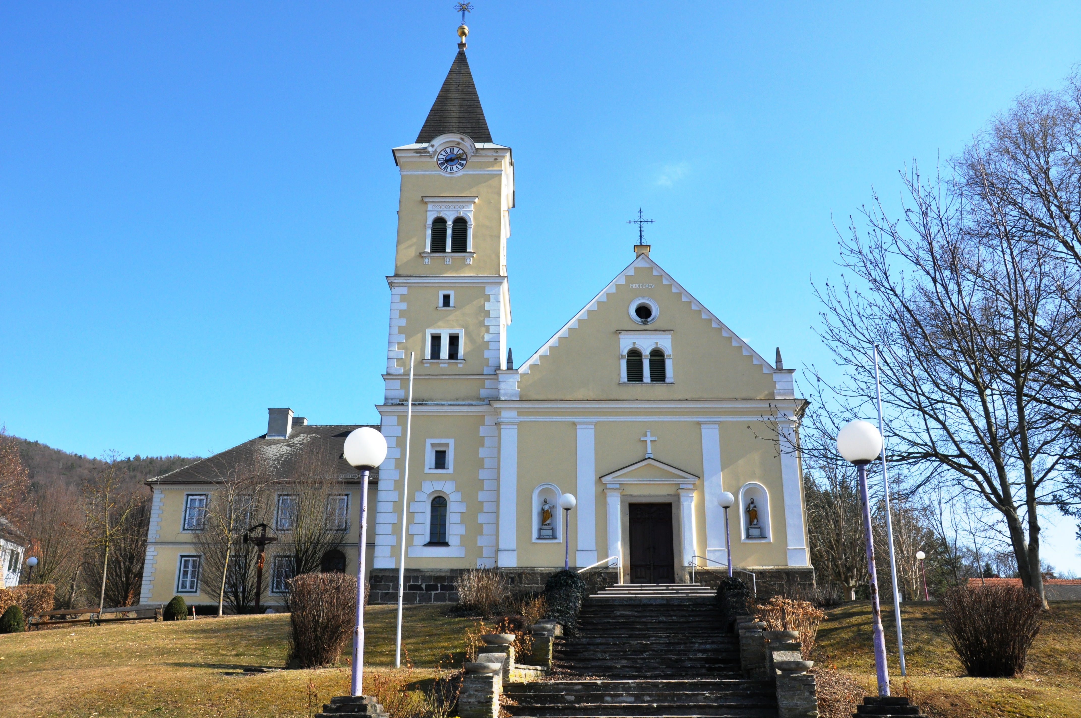 Kath. Pfarrkirche Hl. Dreifaltigkeit